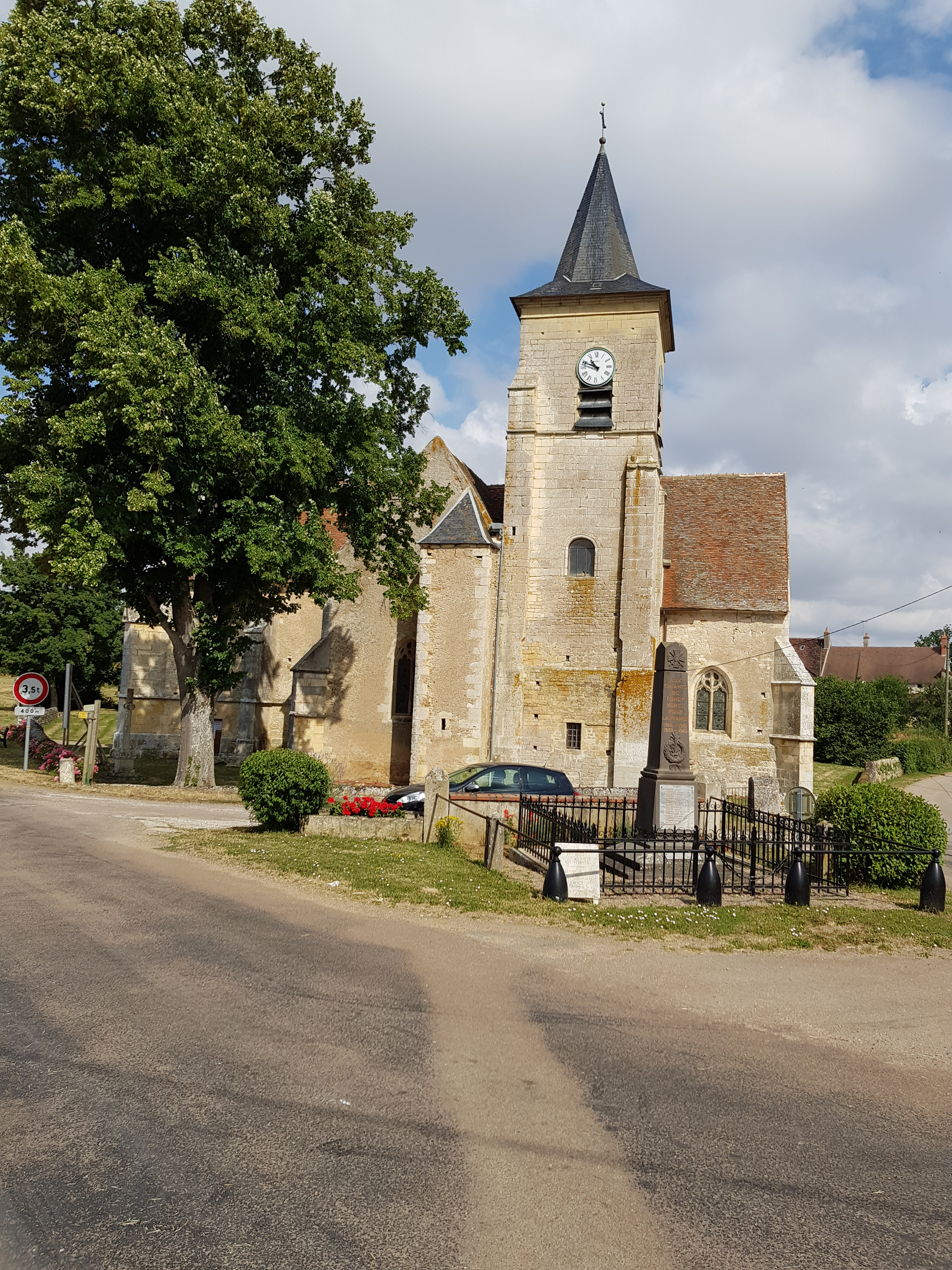 Eglise de Cuncy-lès-Varzy, Nièvre.